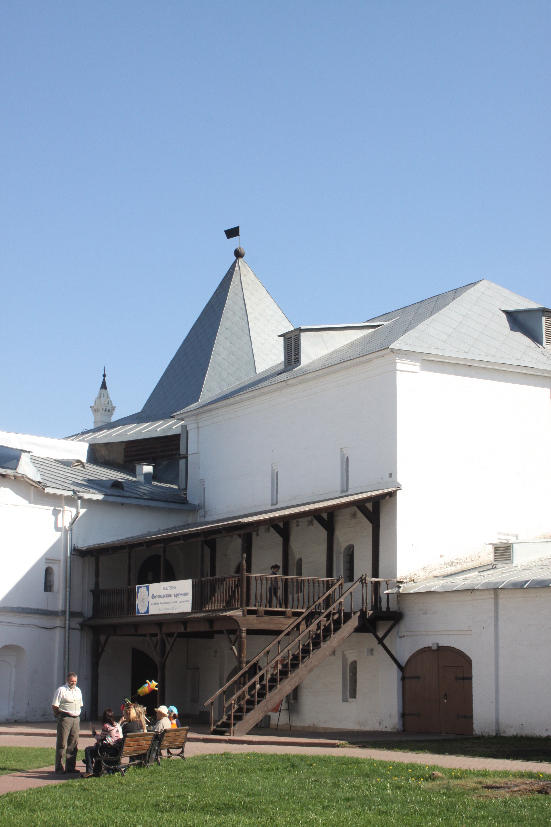 Юго-западная башня внутри. Вологда